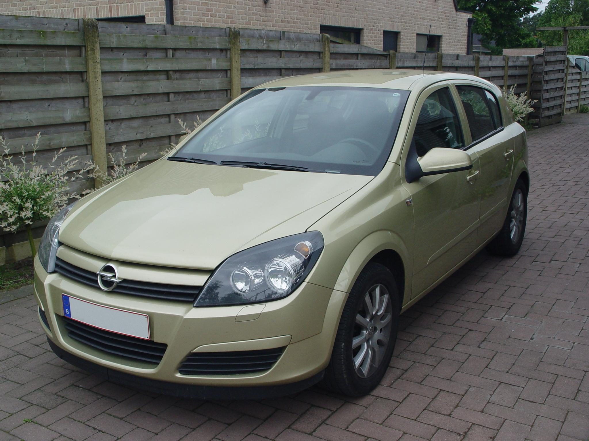 A/Een Opel Astra 2005 in Papyrus Color/Kleur